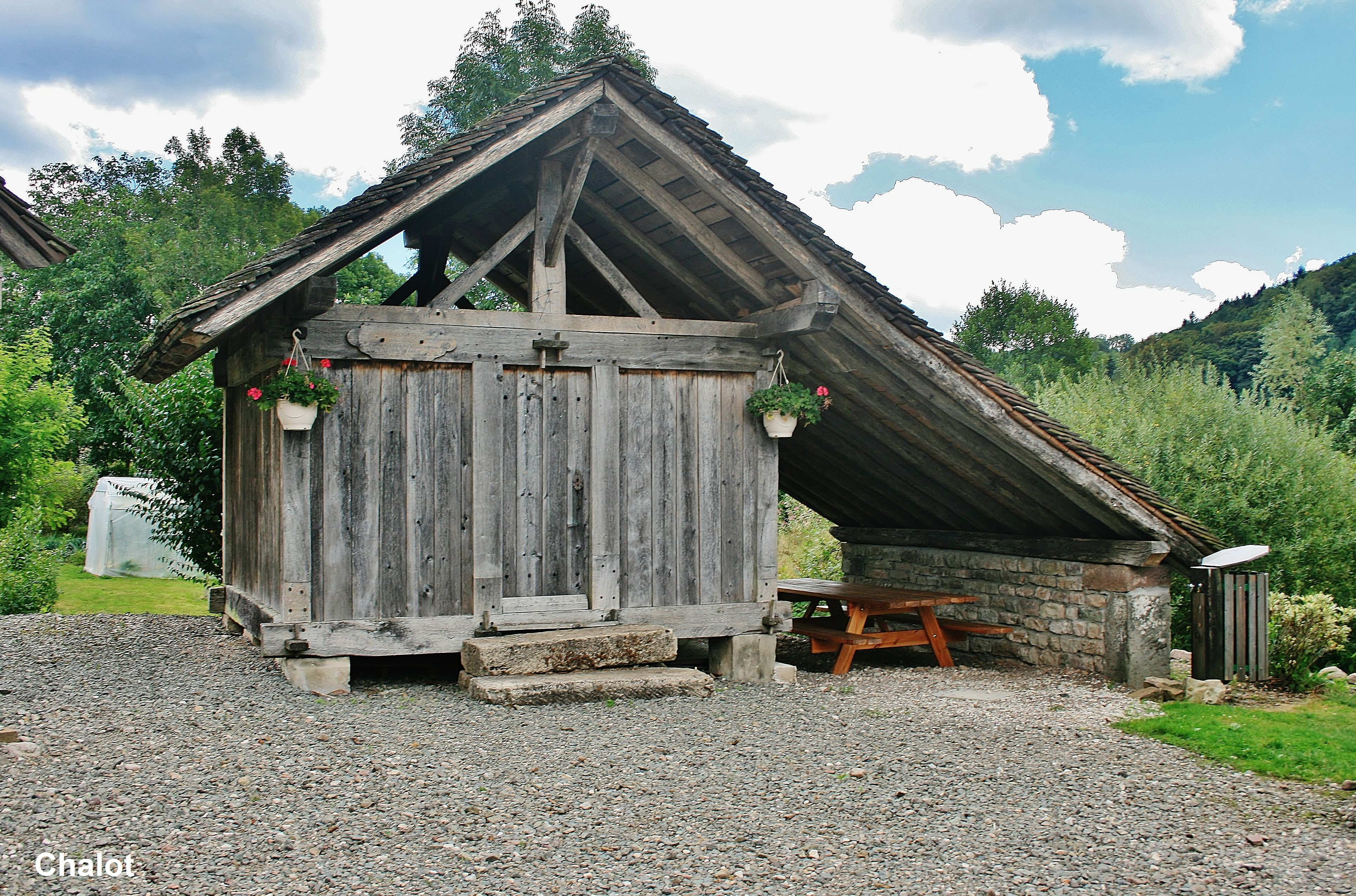 Grenier chalot de Saint-Bresson